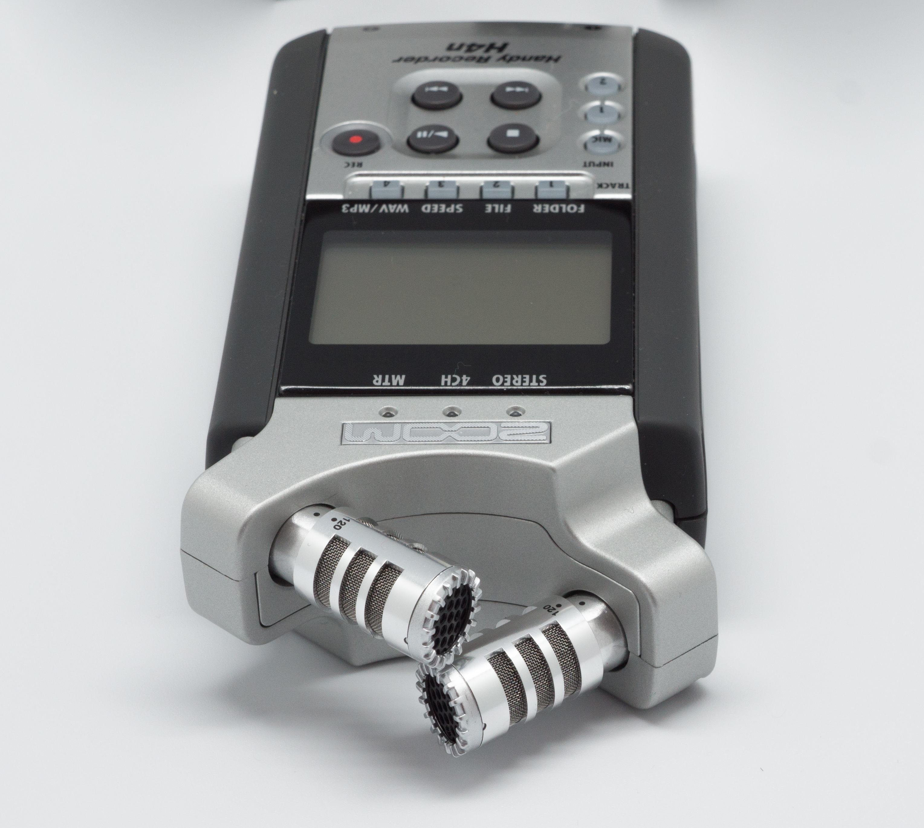 Enregistreur portable